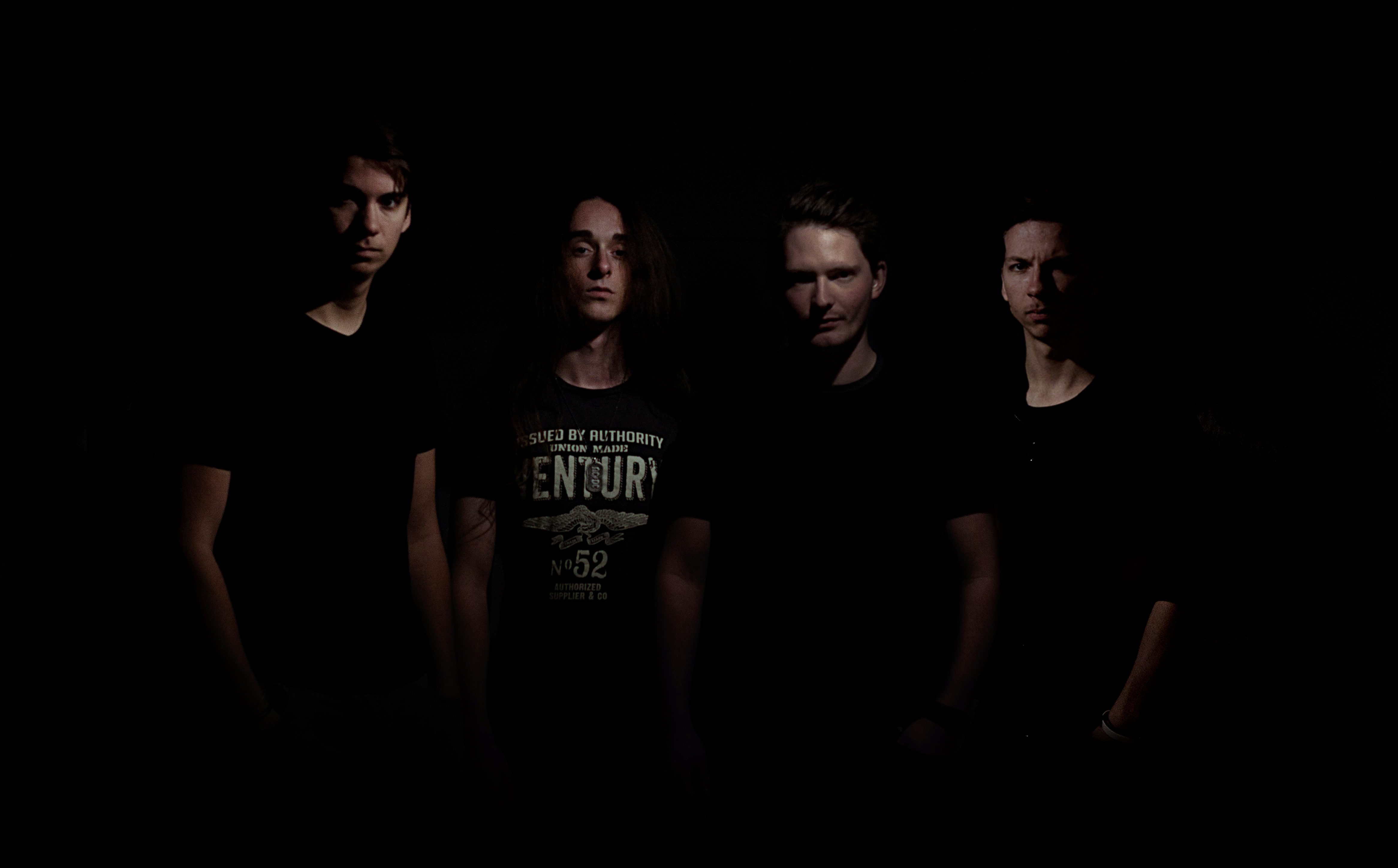 Photo shooting promotionnel du groupe Sadraen